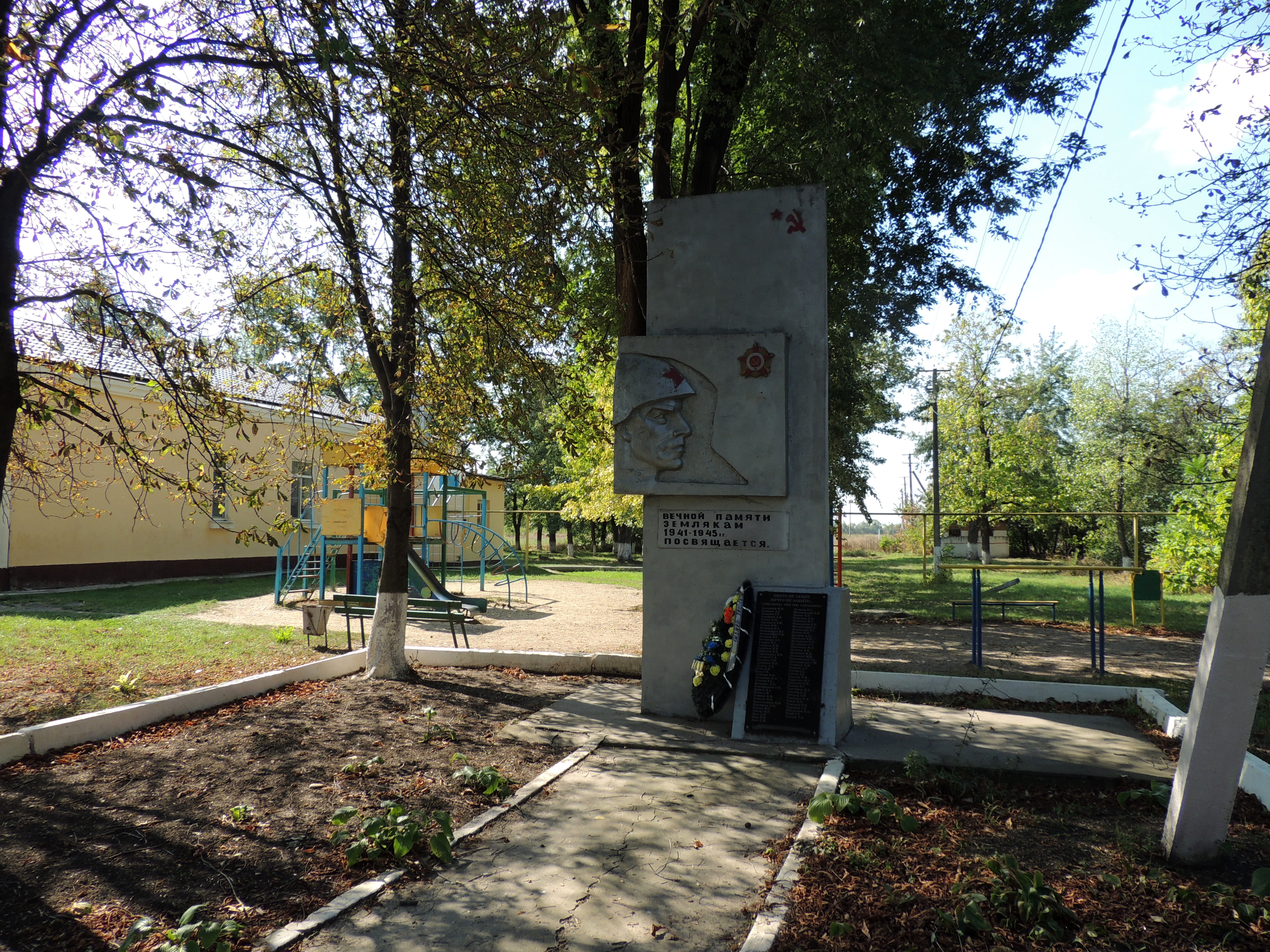 обелиск землякам, погибшим в годы Великой Отечественной войны: парк, с. новосельское, Новокубанский район, Краснодарский край